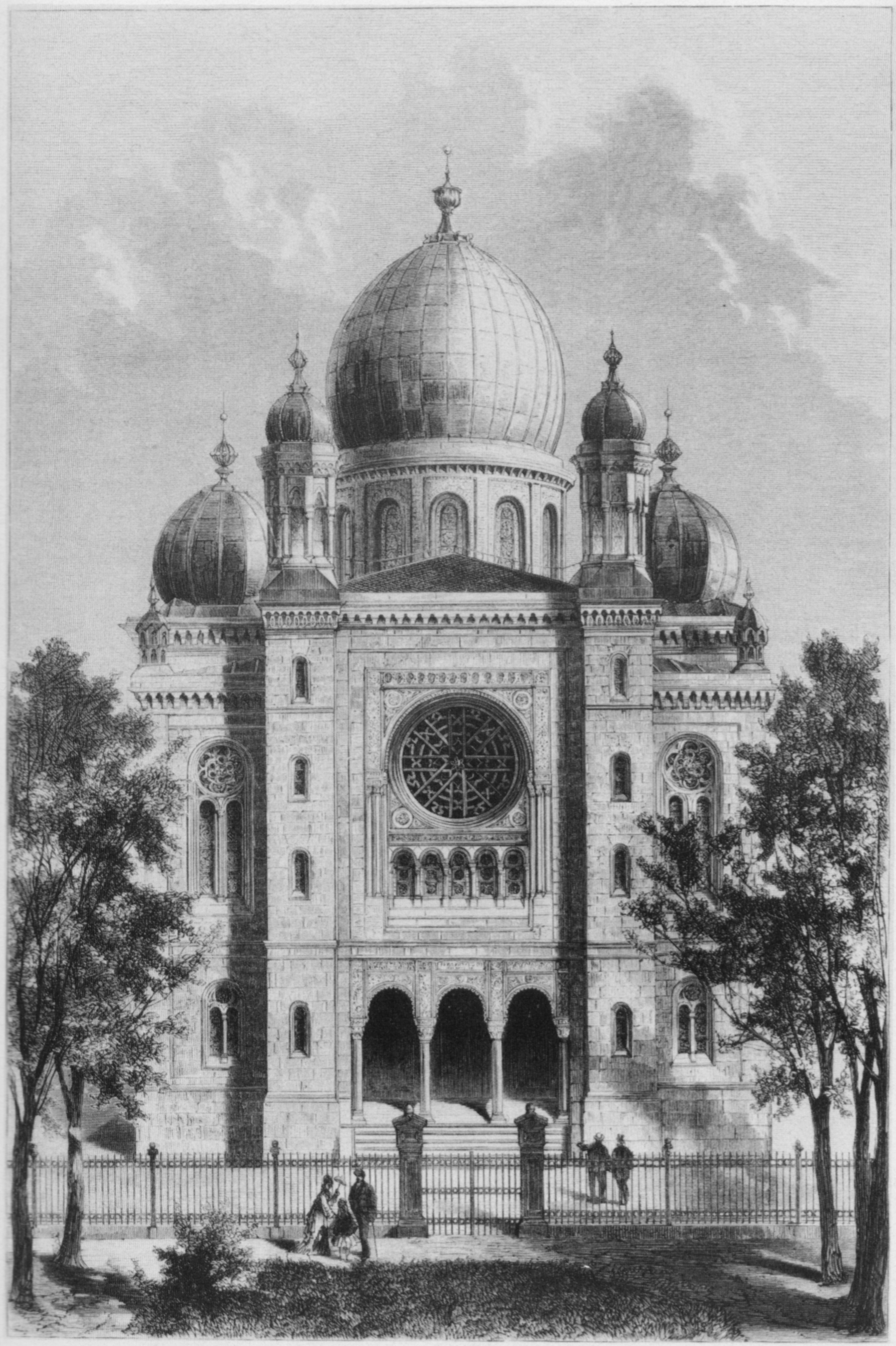 Die Synagoge in Heilbronn 1877. Holzstich von L. Hartmann